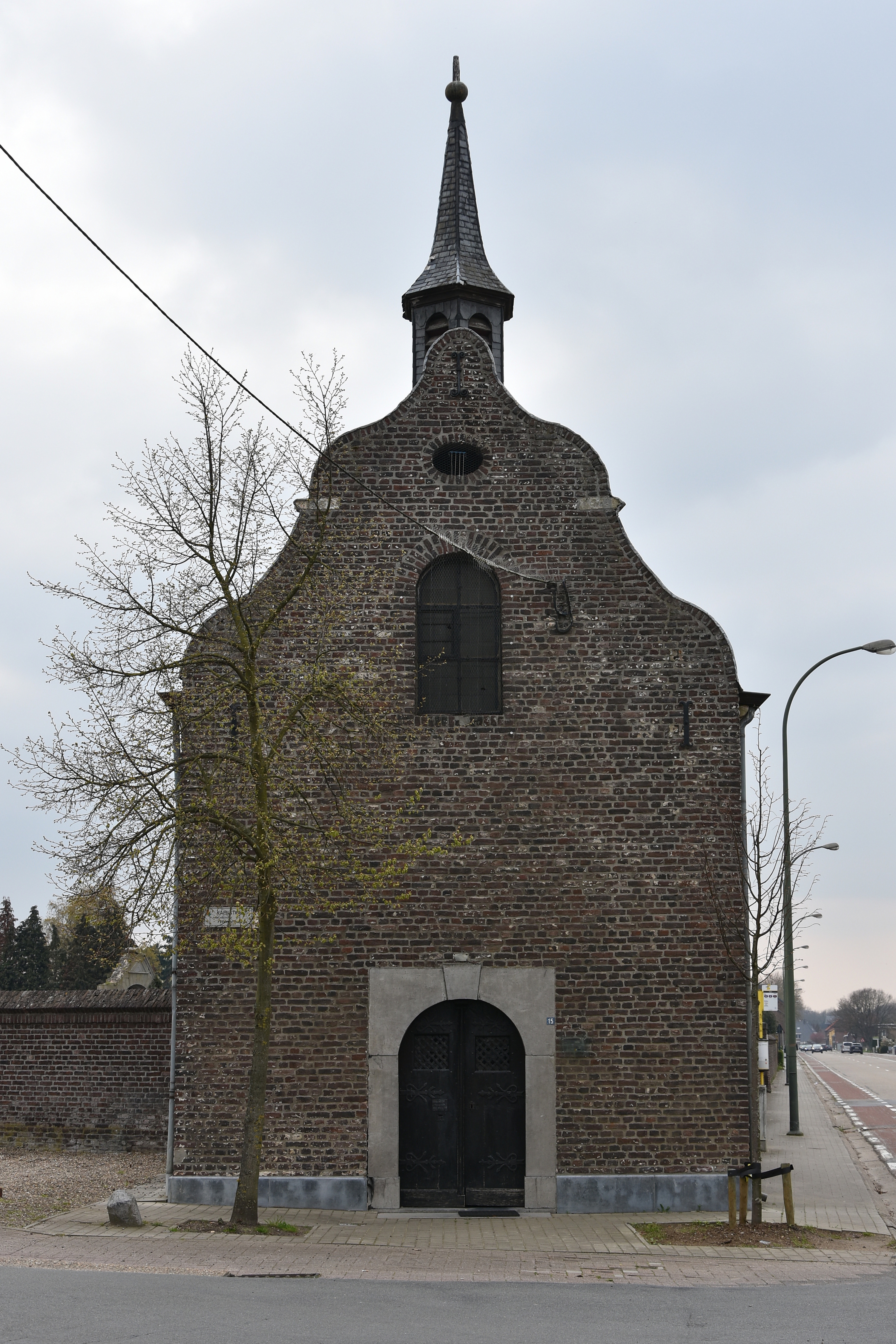 Kapel Onze-Lieve-Vrouw van Bijstand Stokkem 5-04-2019 15-44-58